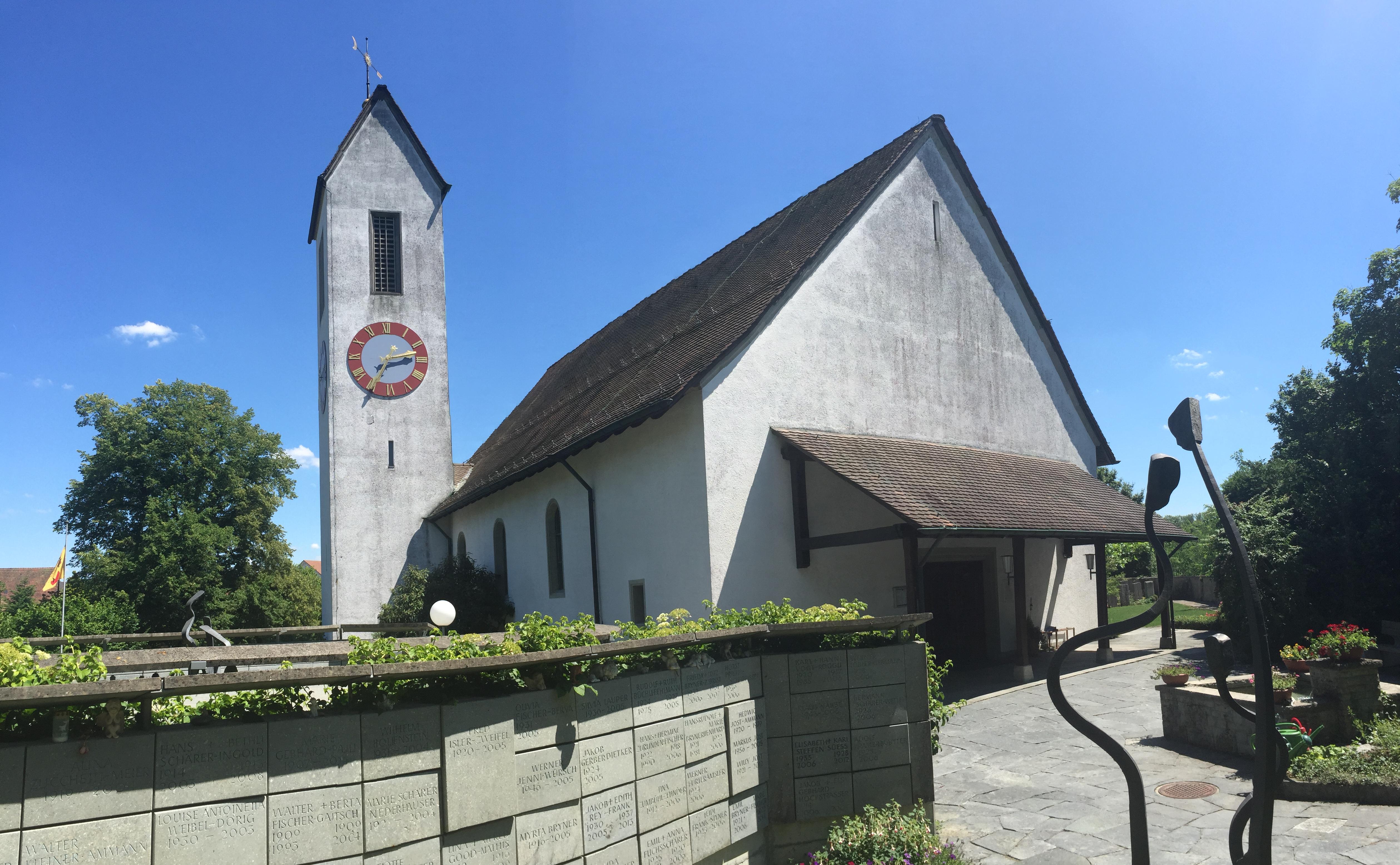 Reformierte Kirche Möriken